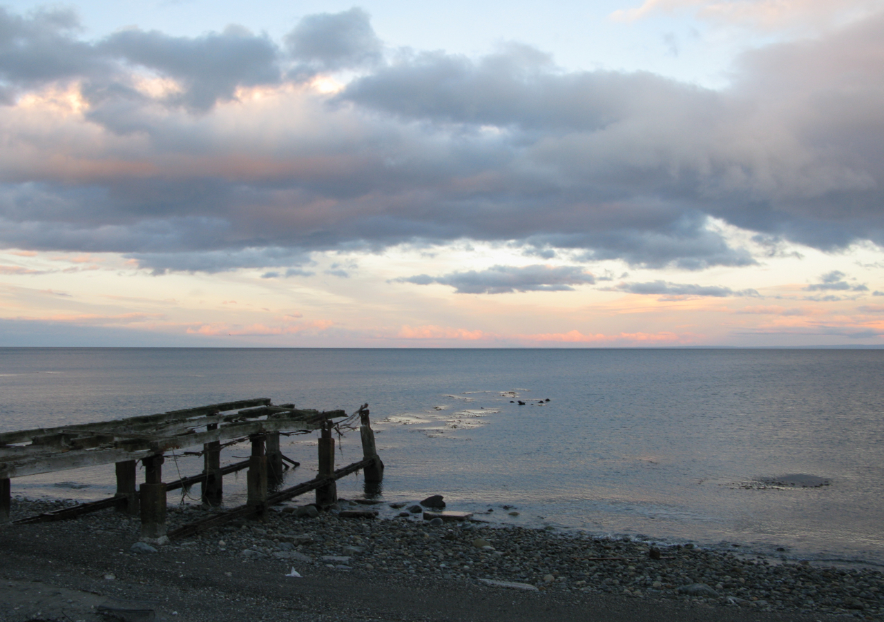 Site historique de Rio Seco (Punta Arenas) - Chili